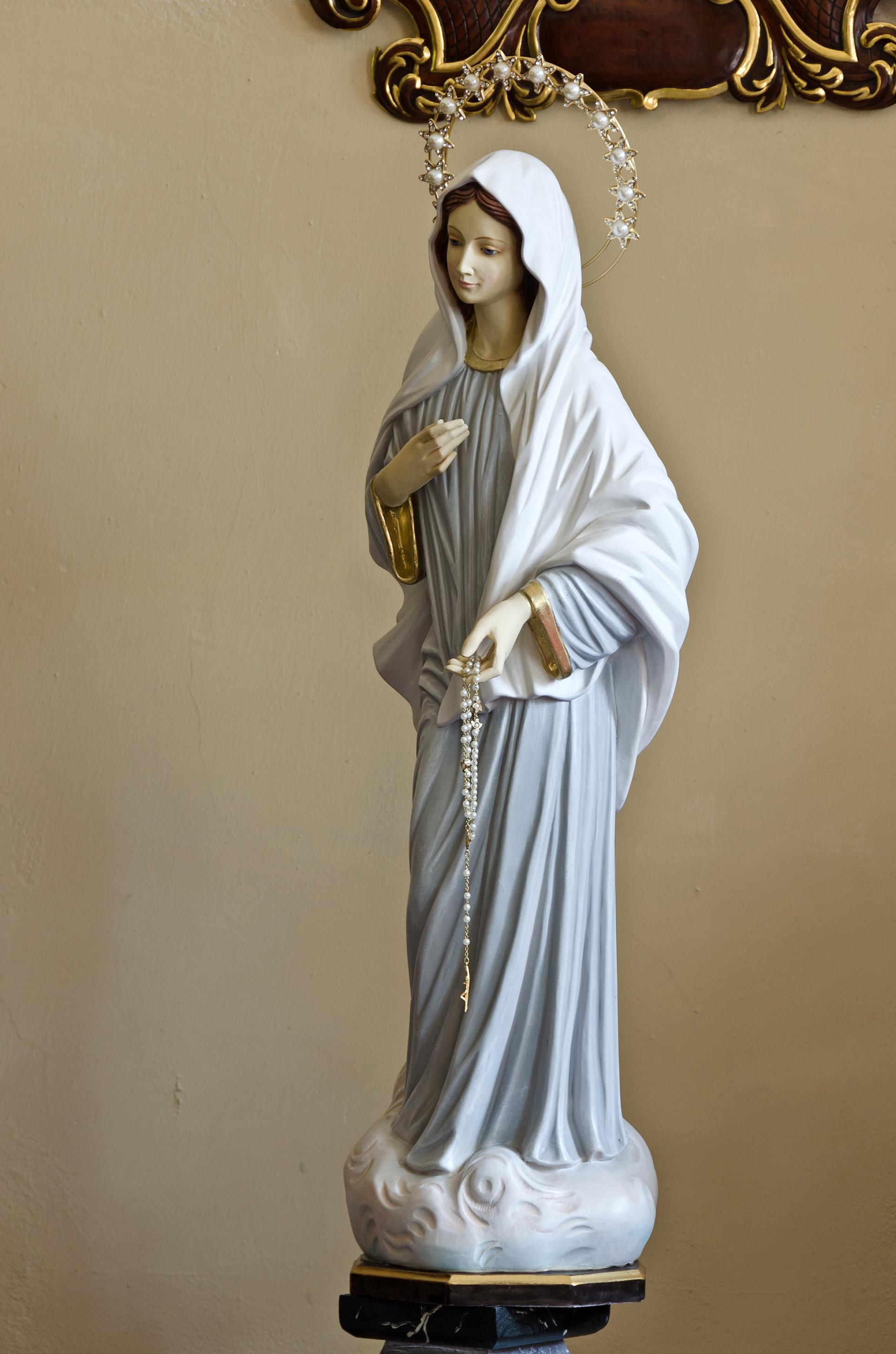 Lądek-Zdrój, ul. Lipowa - kaplica zdrojowa p.w. NMP Na Pustkowiu z 2 poł. XVIII w.